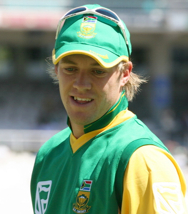 AB De Villiers